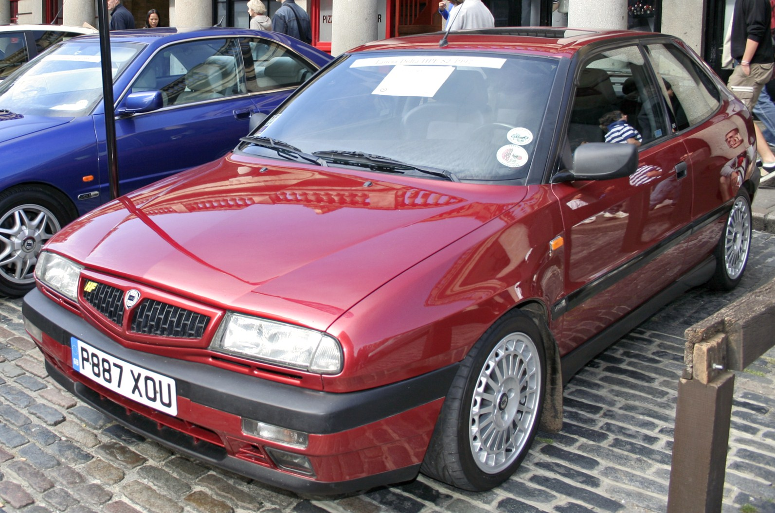 Lancia Delta HF Seconda serie tre porte